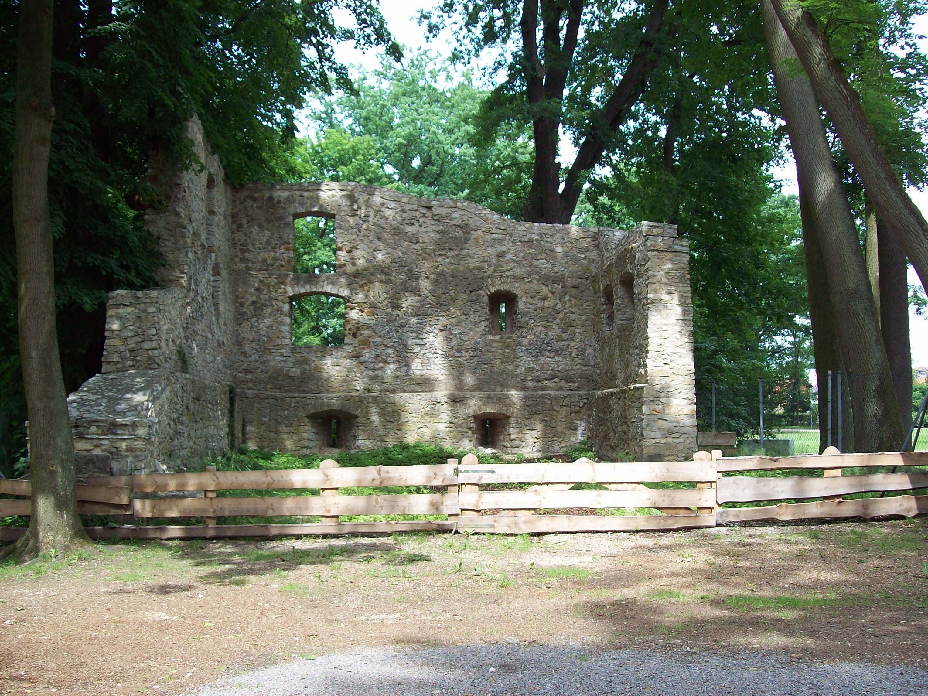 Foto der Burgruine im Stadtpark von Teublitz.